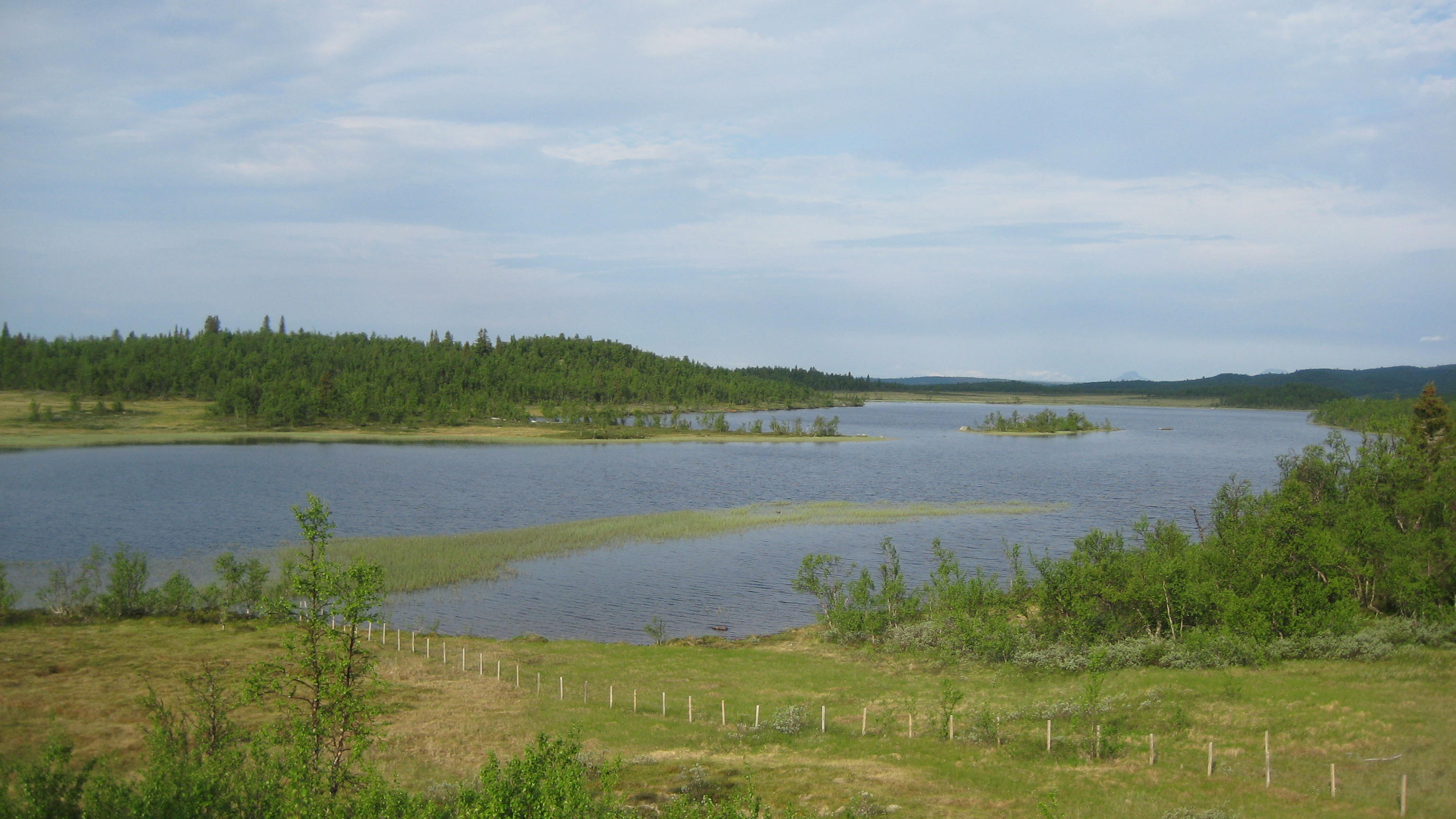 Sebu-Røssjøen